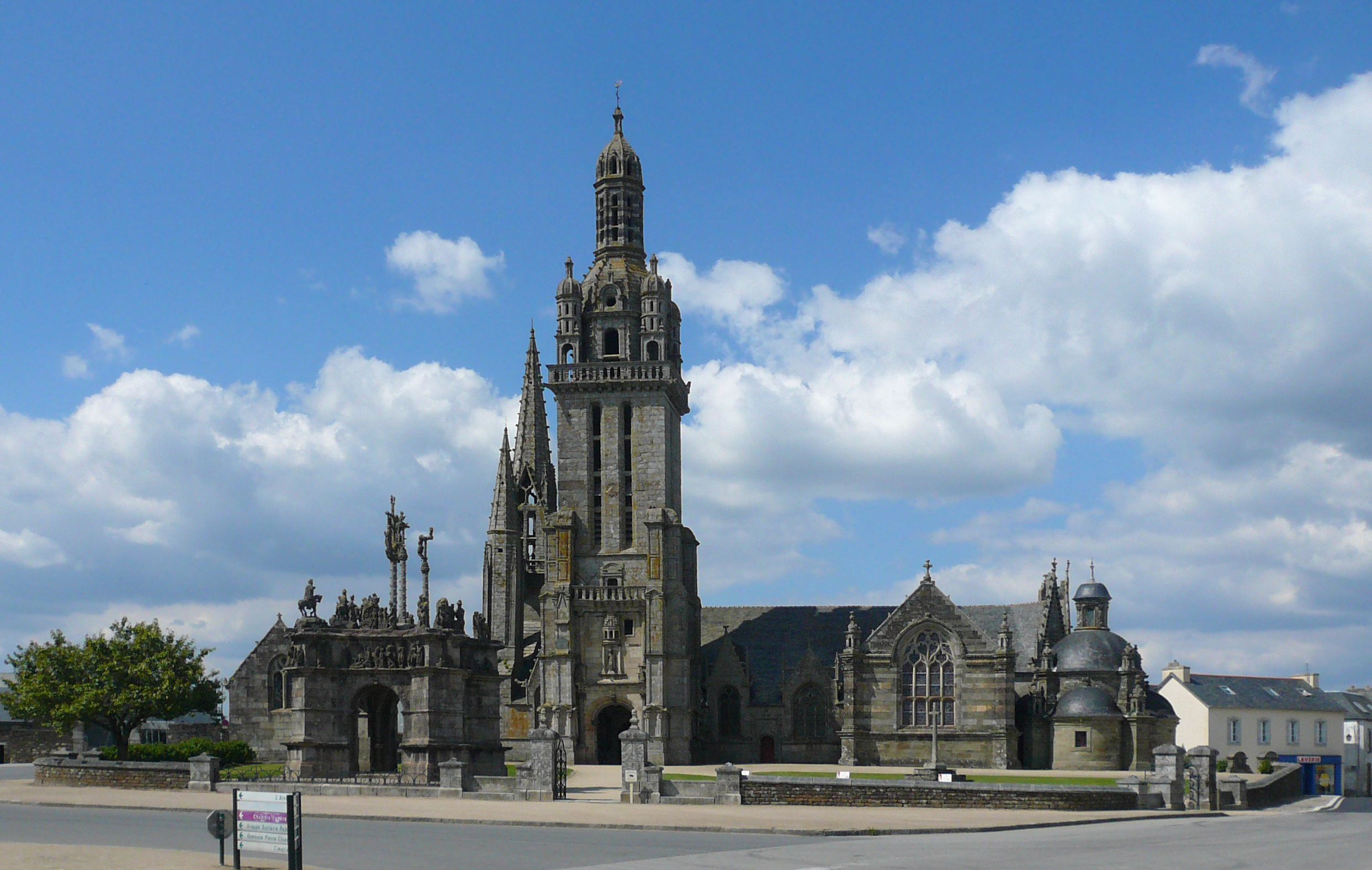 Vue d'ensemble de l'enclos paroissial de Pleyben, Finistère, Bretagne, France.